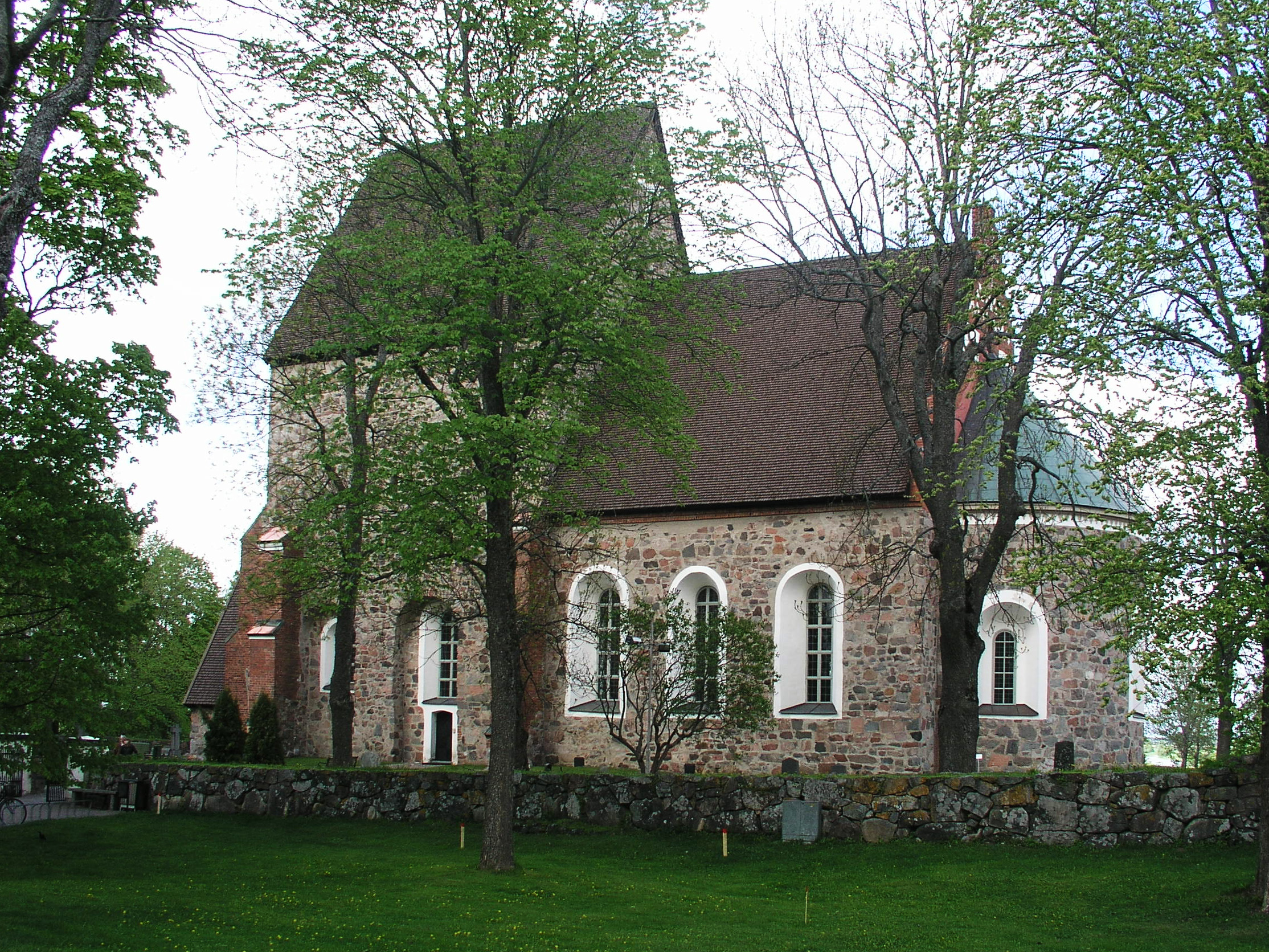 Gamla Uppsala kyrka, Diocese of Uppsala, Gamla Uppsala, Sweden. View.